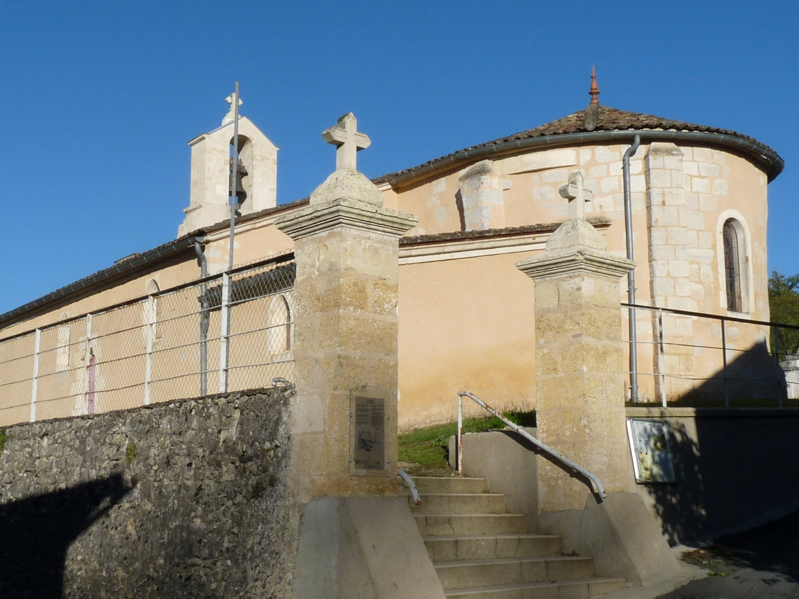 Eglise de La Clotte, Charente-Maritime, France